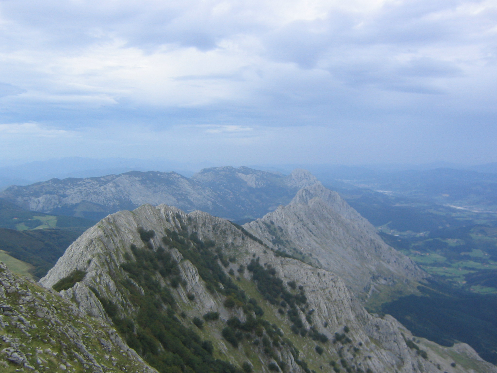 Sierra del Anboto (Duranguesado)Vizcaya, País Vaco, España.